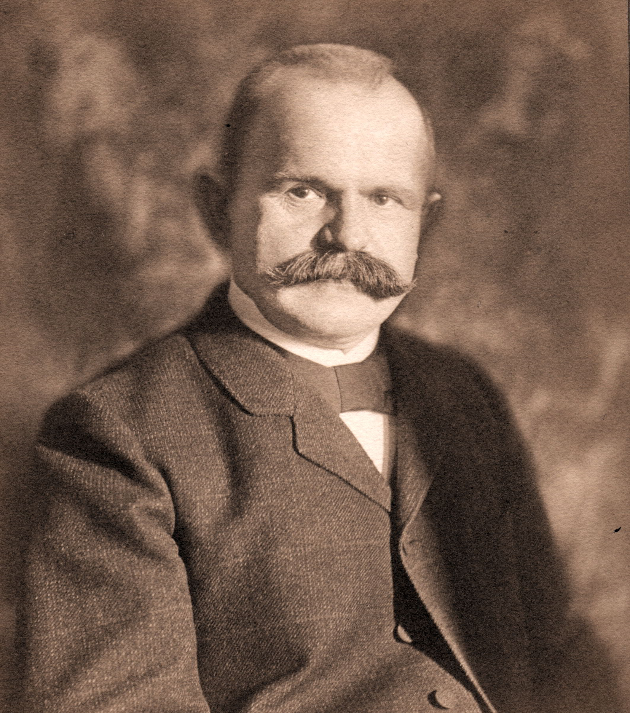 Porträt des schweizerischen Sprachwissenschafters Prof. Dr. Albert Bachmann, Ordinarius an der Universität Zürich und Chefredaktor des Schweizerischen Idiotikons, aufgenommen ca. 1905